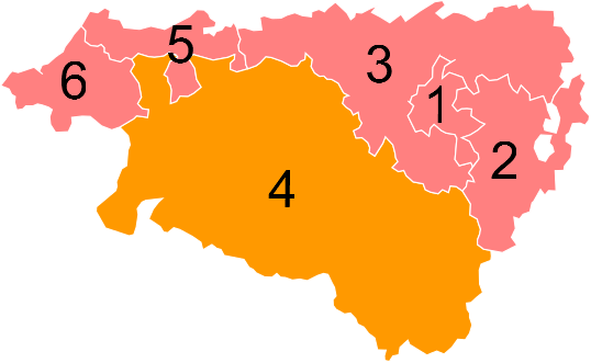 Résultats des élections législatives des Pyrénées-Atlantiques en 2012